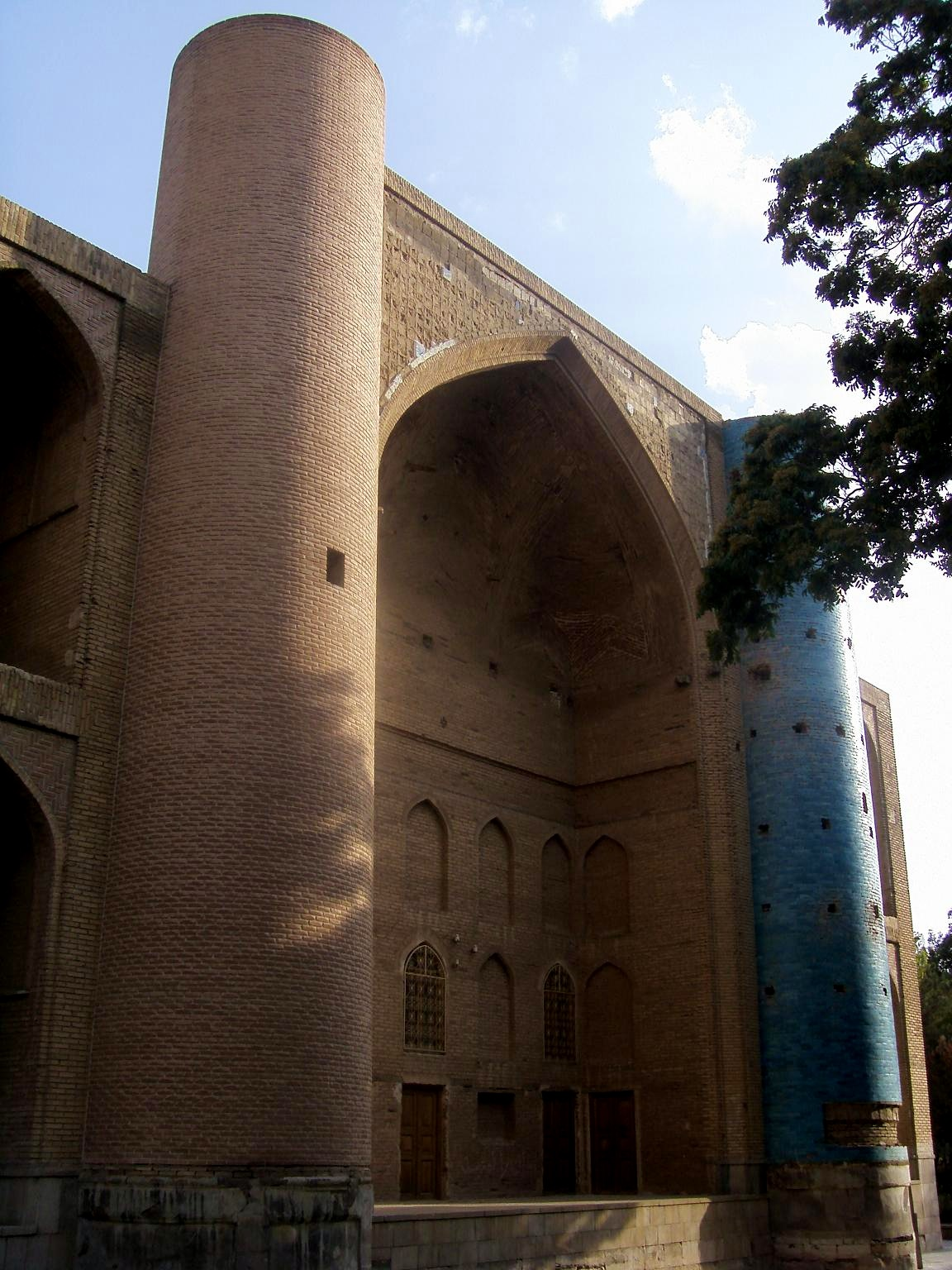 Sheikh-shahab tomb, Ahar, Iran